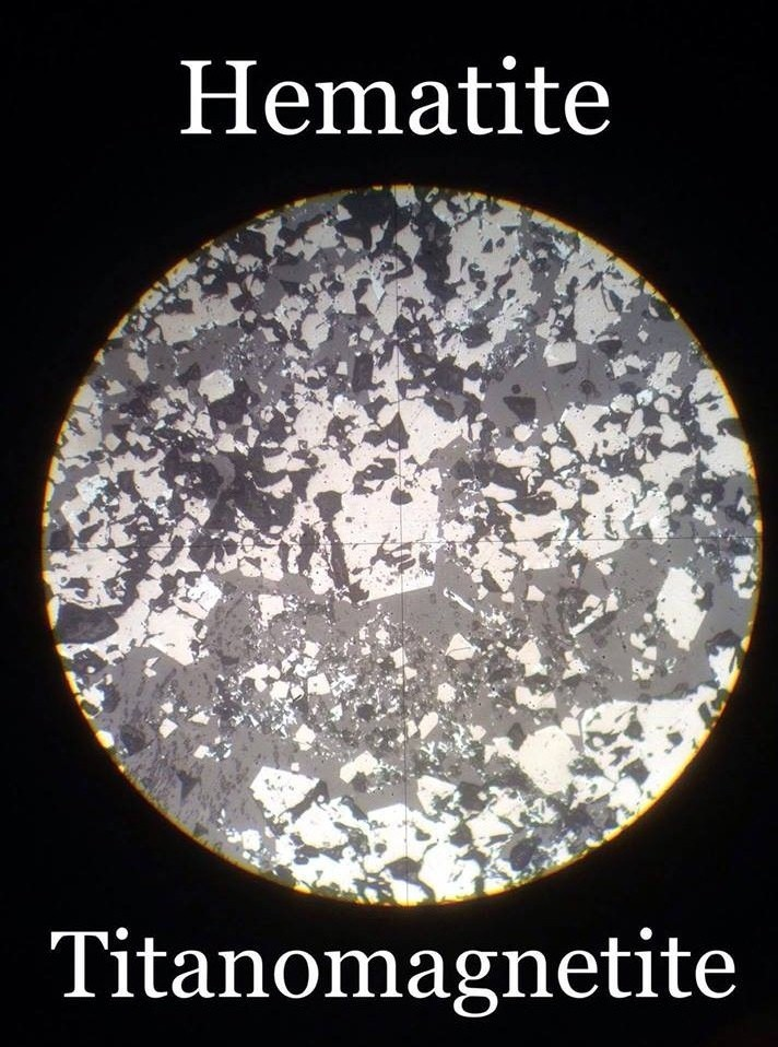 Microscopic image of Hematite - Titanomagnitite